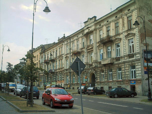 3 Maja street in Piotrkow Trybunalski